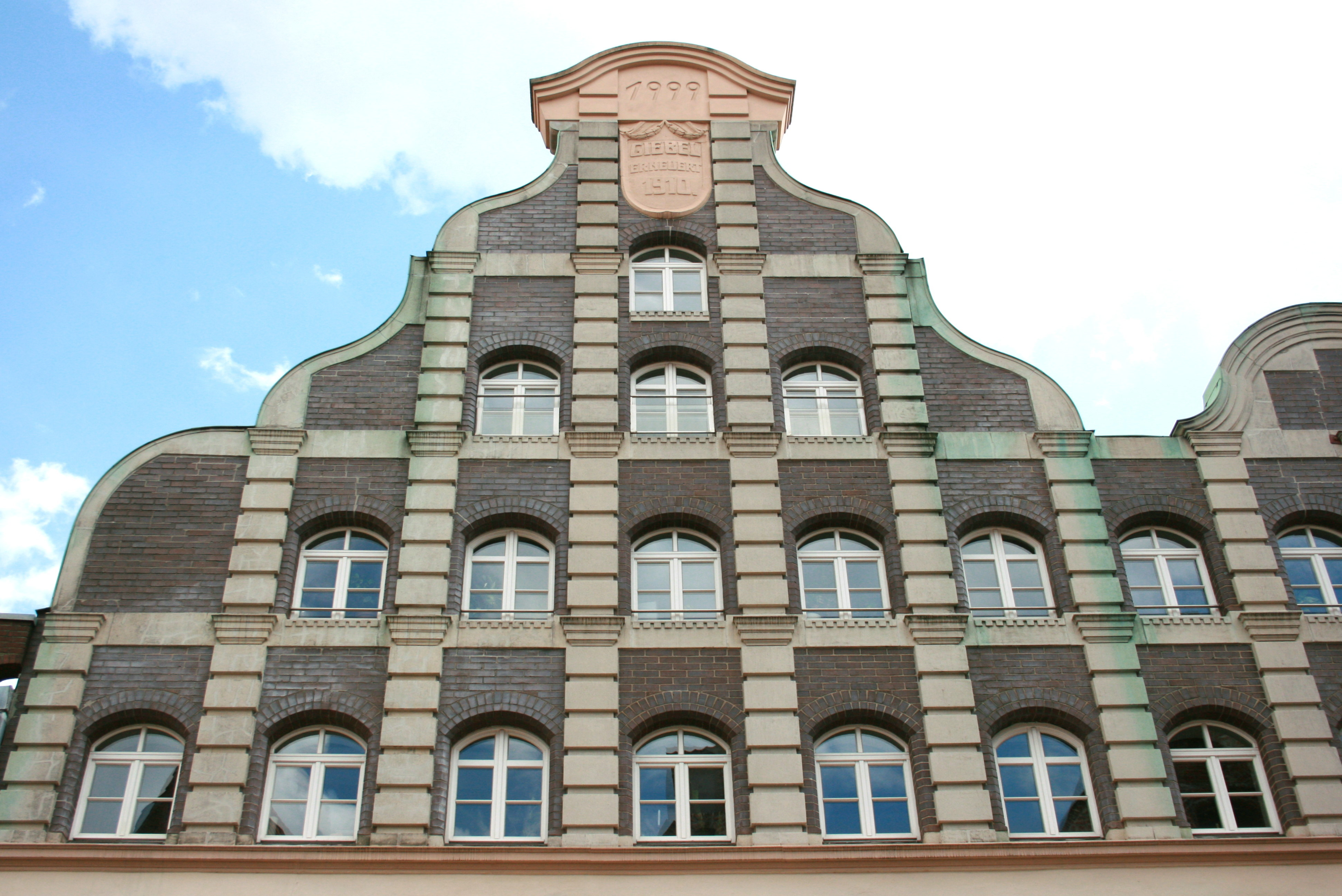 Am Berge in Lüneburg. Haus Am Berge 39, Giebel von 1910 (Architekt Hermann Matthies)